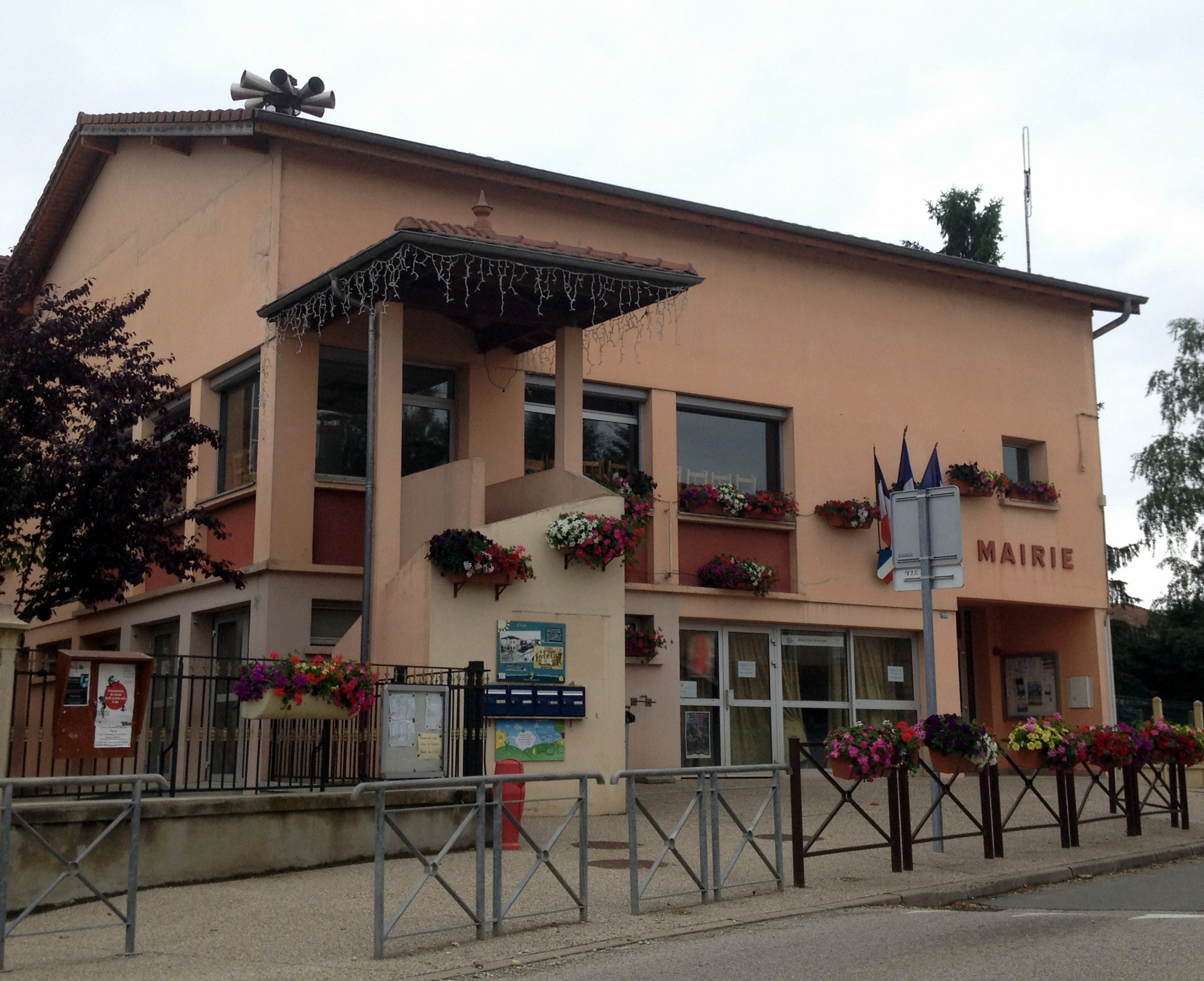 Mairie de Pizay.